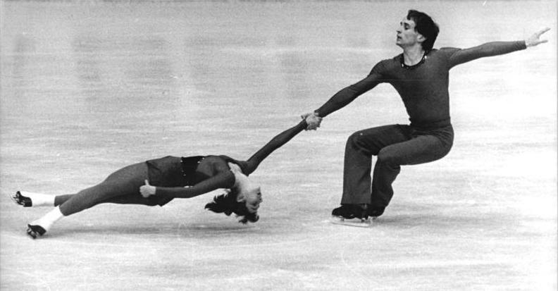 Birgit Lorenz, Knut Schubert ADN-ZB Thieme 30.1.81 Karl-Marx-Stadt: Als Arbeitsmaterial für die Eiskunstlauf-Europameisterschaften vom 3. bis 8. Februar 1981 in Innsbruck- Ihr EM-Debüt gaben im Paarlauf Birgit Lorenz und Knut Schubert vom SC Dynamo Berlin. Die DDR-Meister zeigen hier die Todesspirale einwärts beim "Pokal der Blauen Schwerter" 1980.